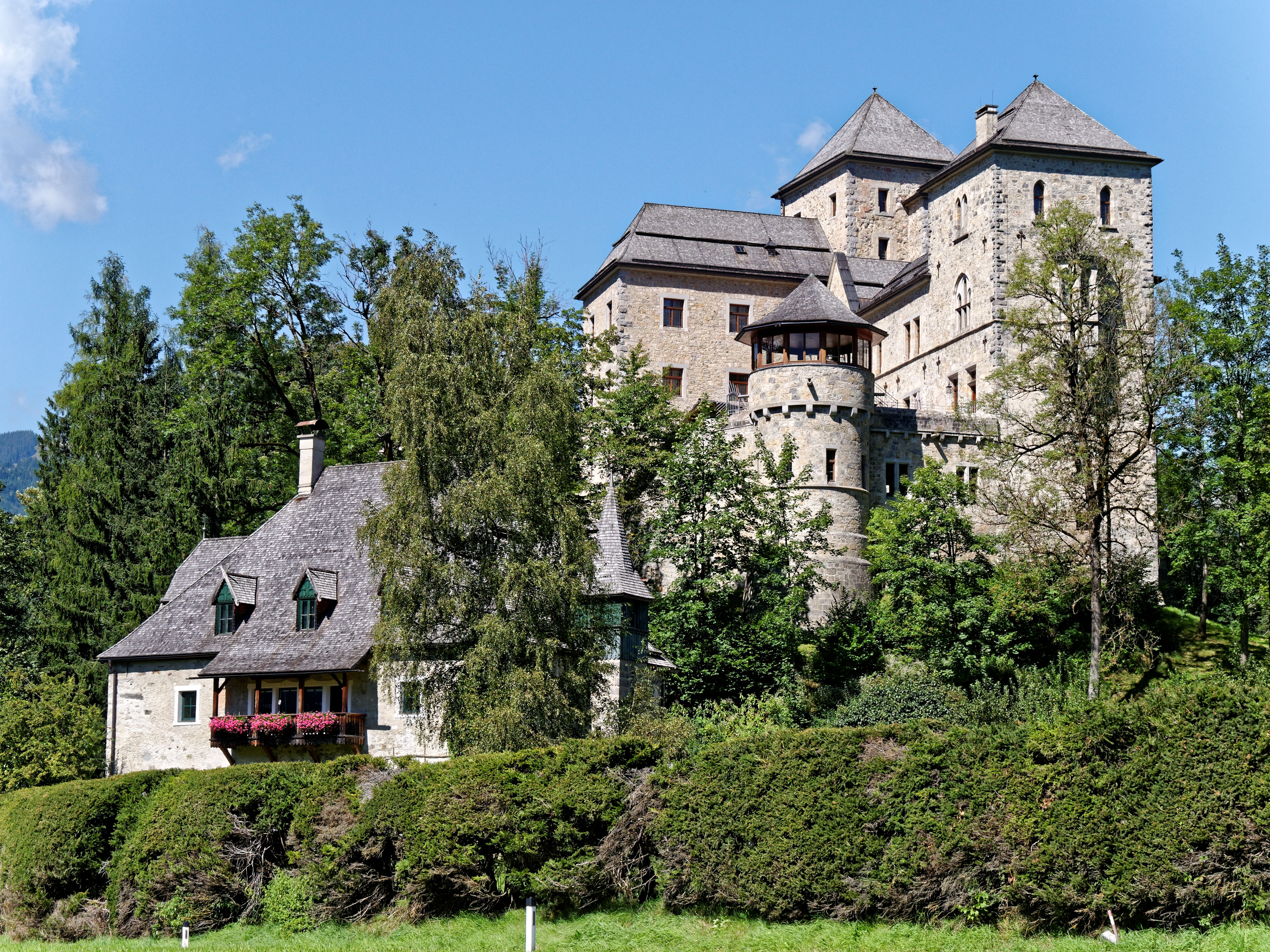 Blick von Südosten auf Schloss Fischhorn. Links im Vordergrund das Meierhaus.